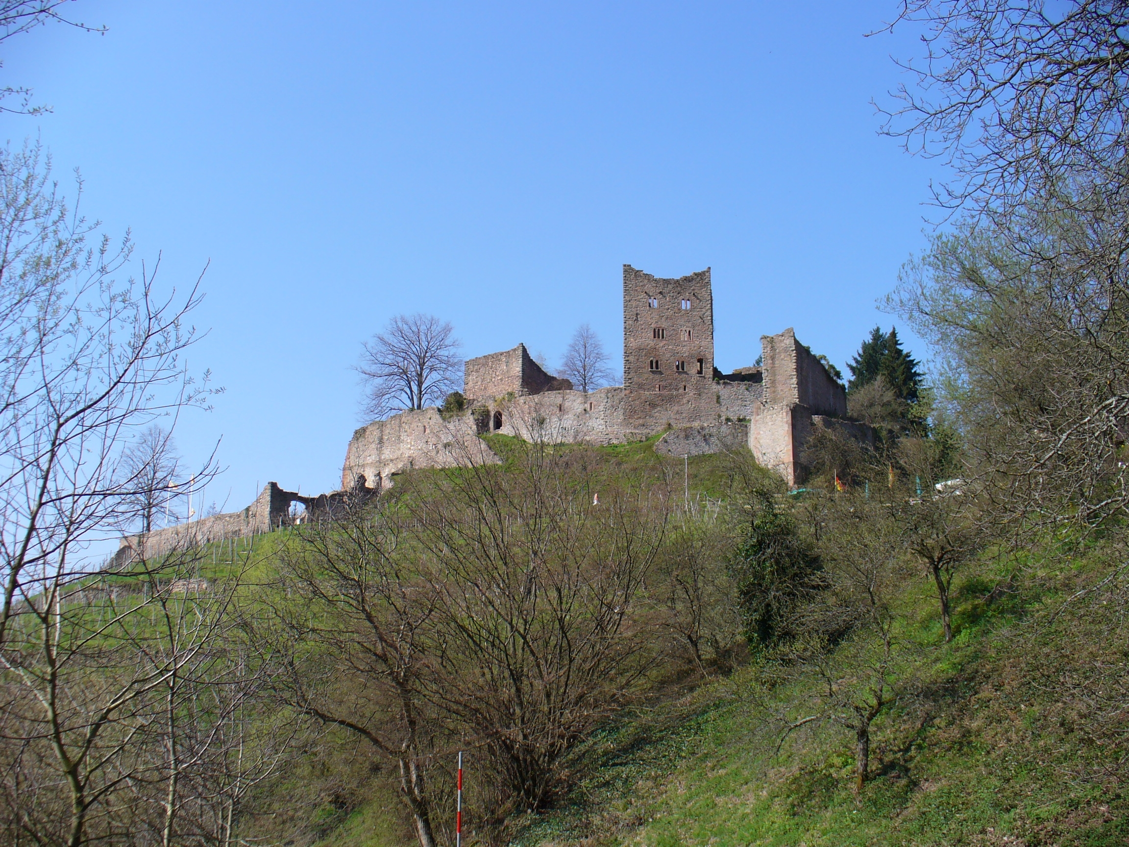 Beschreibung / description: Ruine Schauenburg bei Oberkirch, Deutschland / Ruin Schauenburg near Oberkirch, Germany Quelle / source: selbst fotografiert am / self made at 03. April 2005 Fotograf / photographer: User:Kerish Lizenz / licence